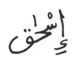 Der Name Ishaq, wie er im Koran steht.